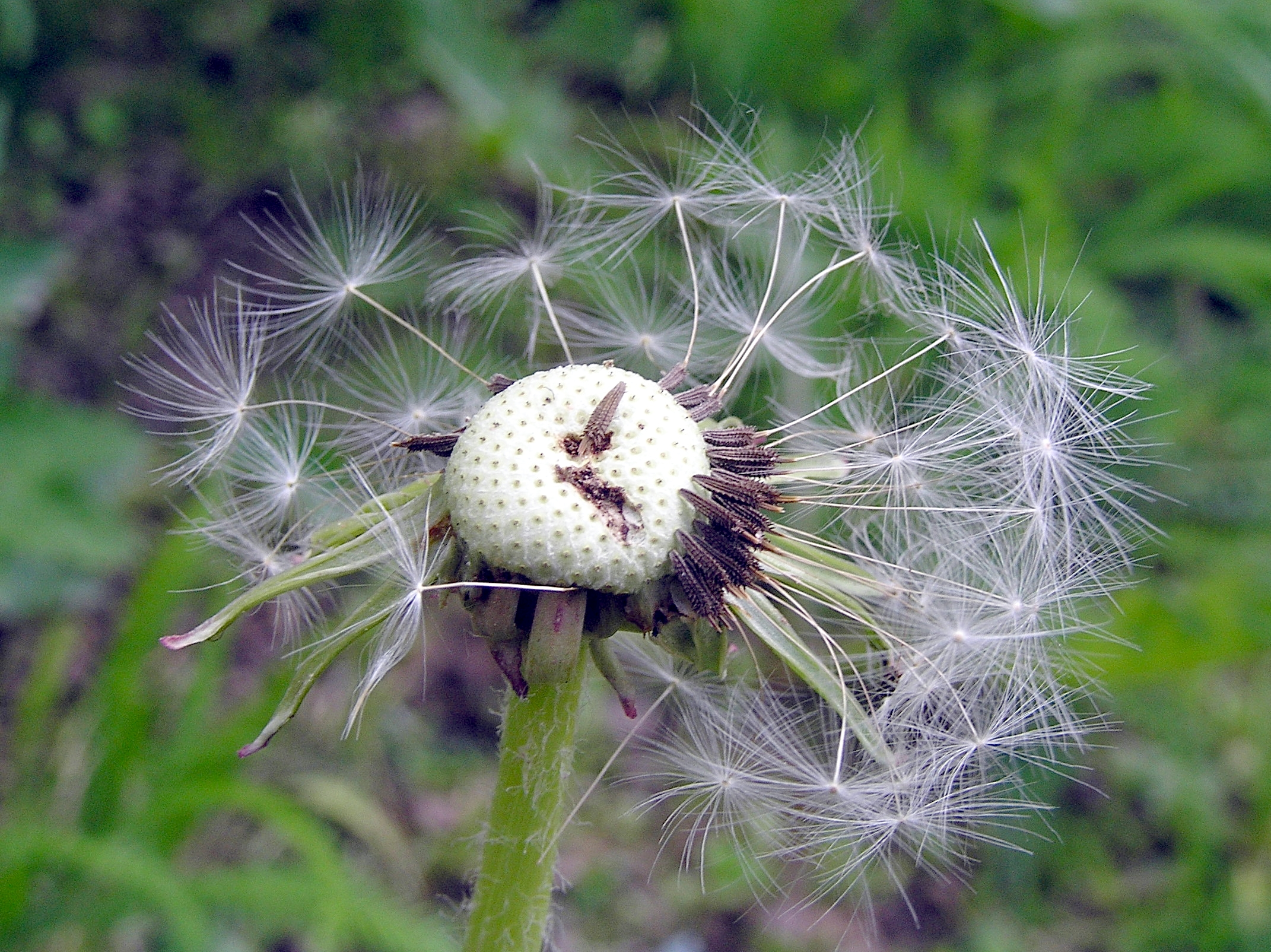 Võilille seemned koos lendkarvadega